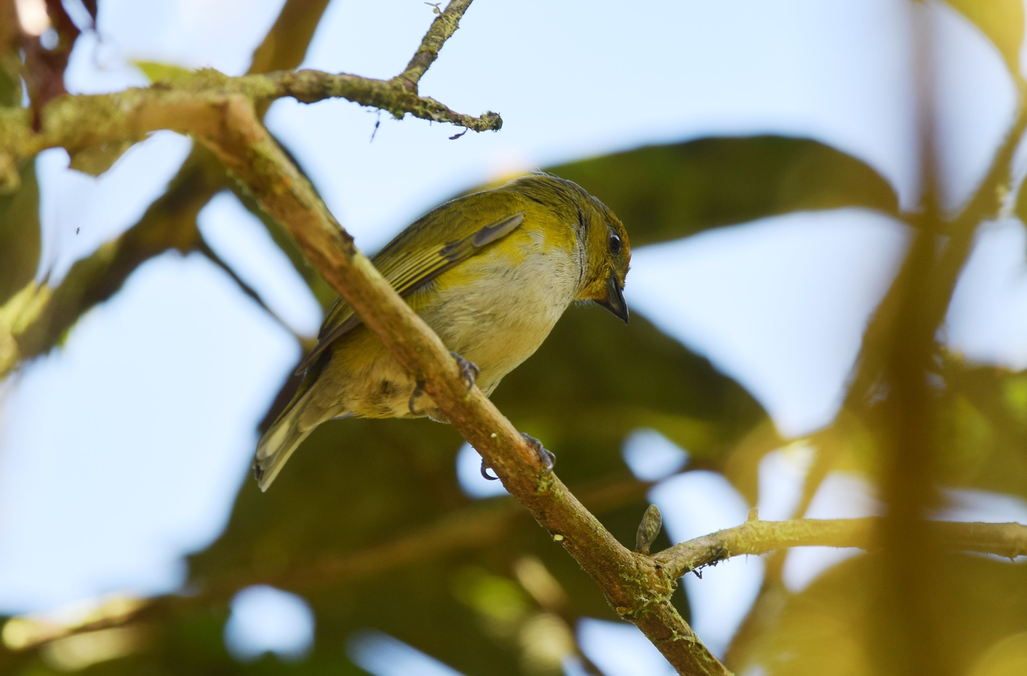 Costa Rica 2/13/16 Cerro Silencio near Rancho Naturalista